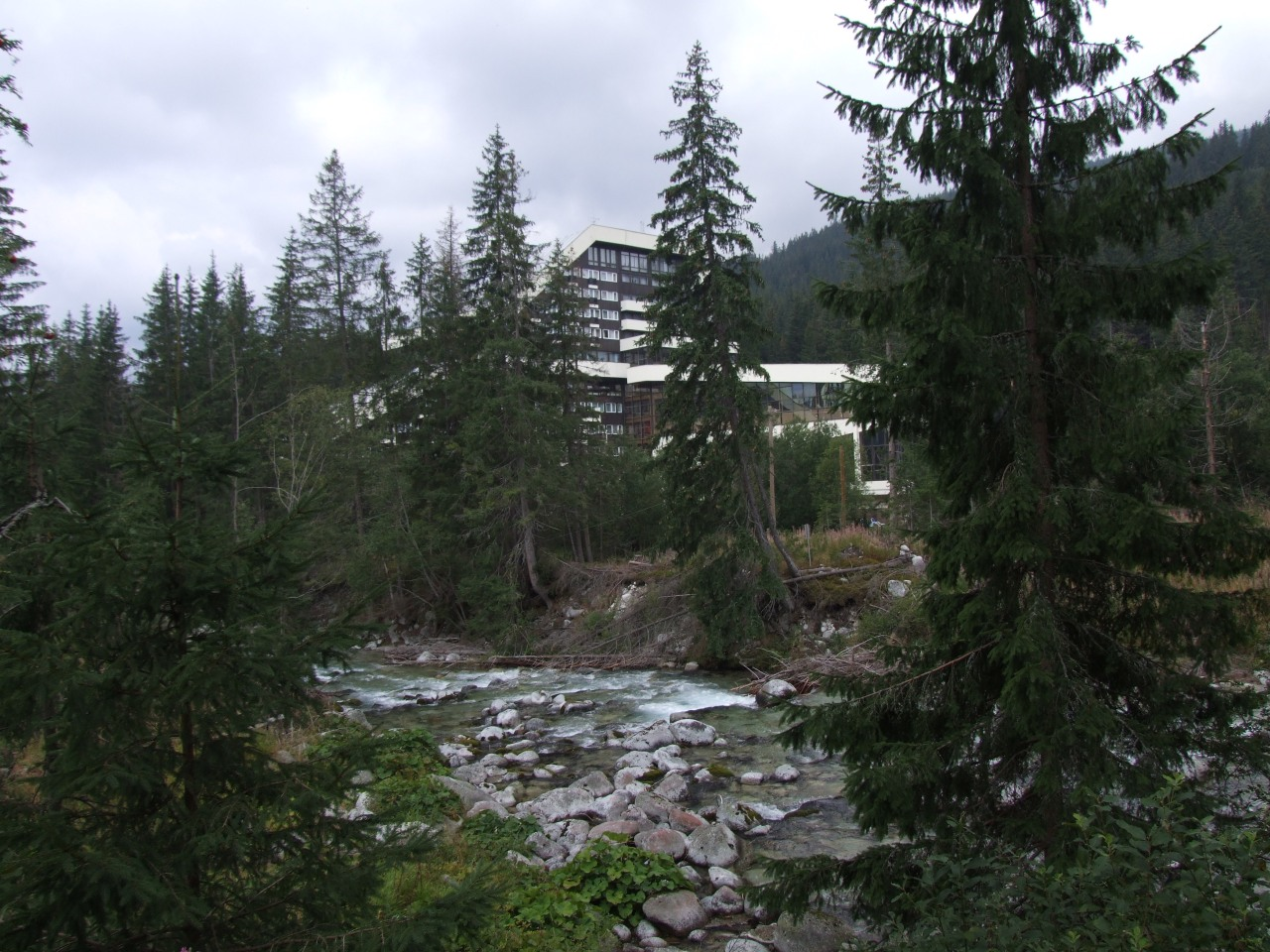 Hotel "Permon" w Podbańskiej